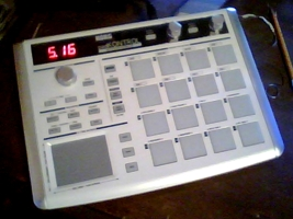 Korg Padkontrol